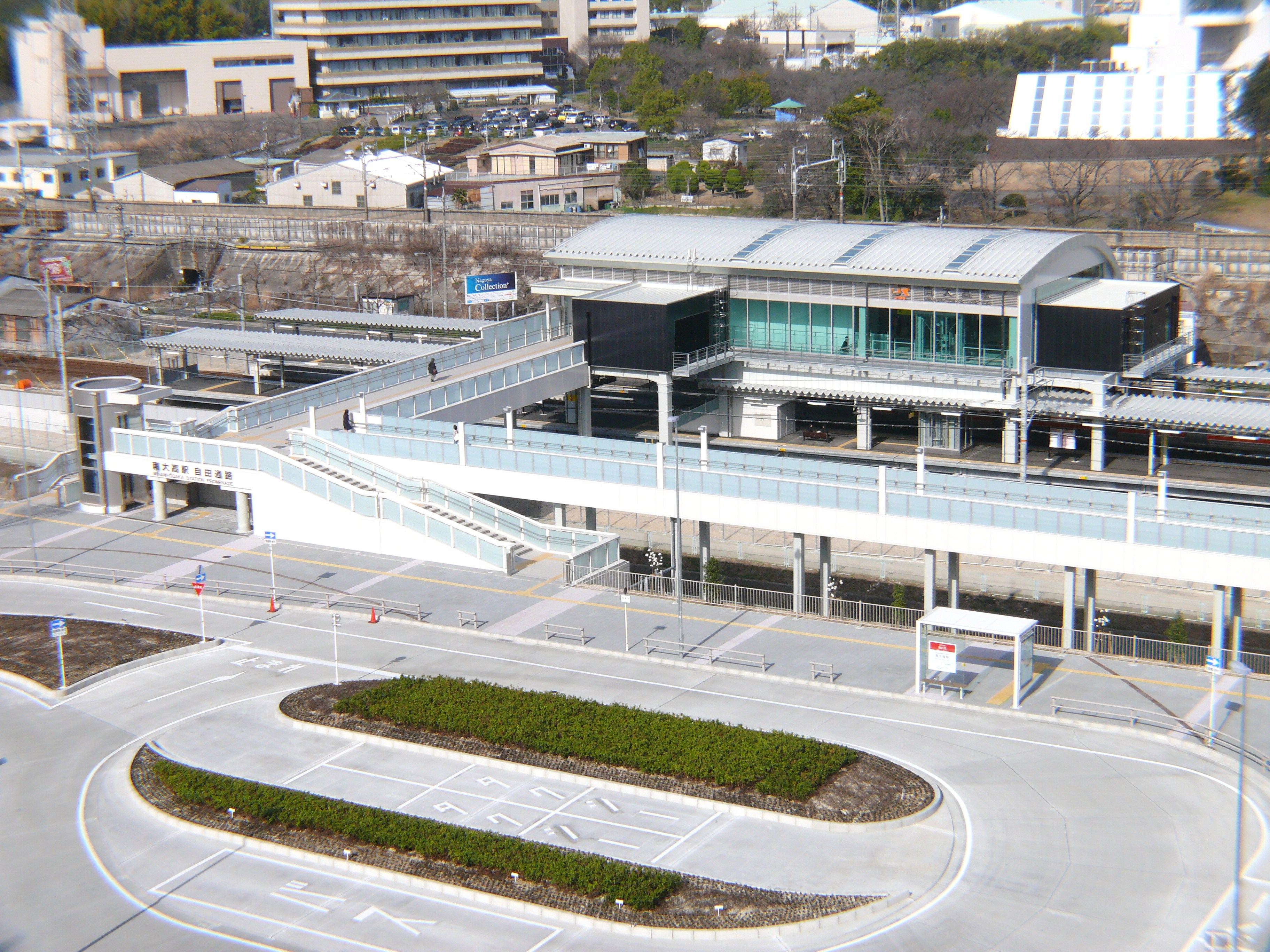 JR東海の東海道本線の南大高駅